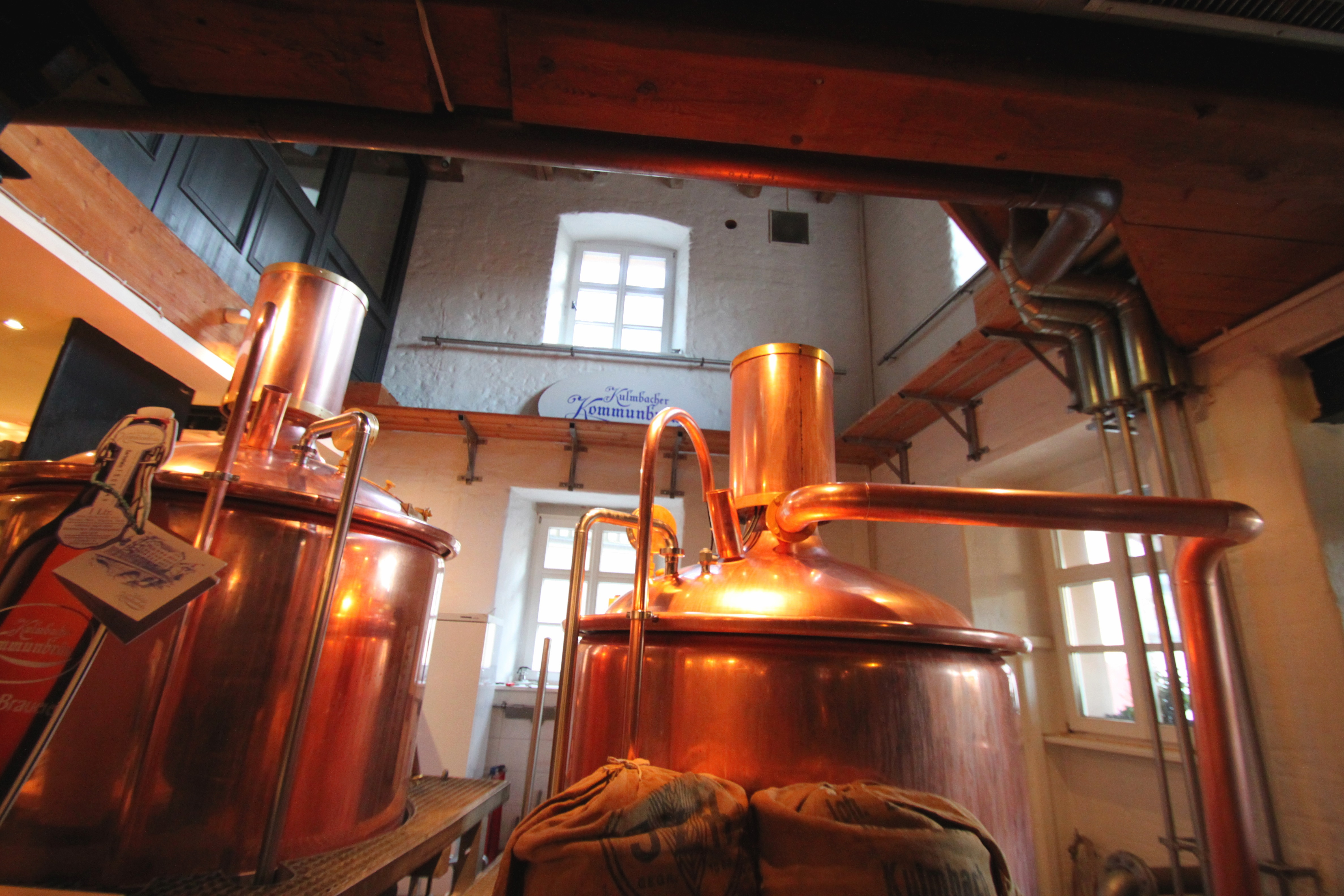 Kupferkessel im Gastraum der Kommunbräu in Kulmbach